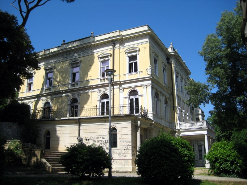 Državni arhiv u Rijeci